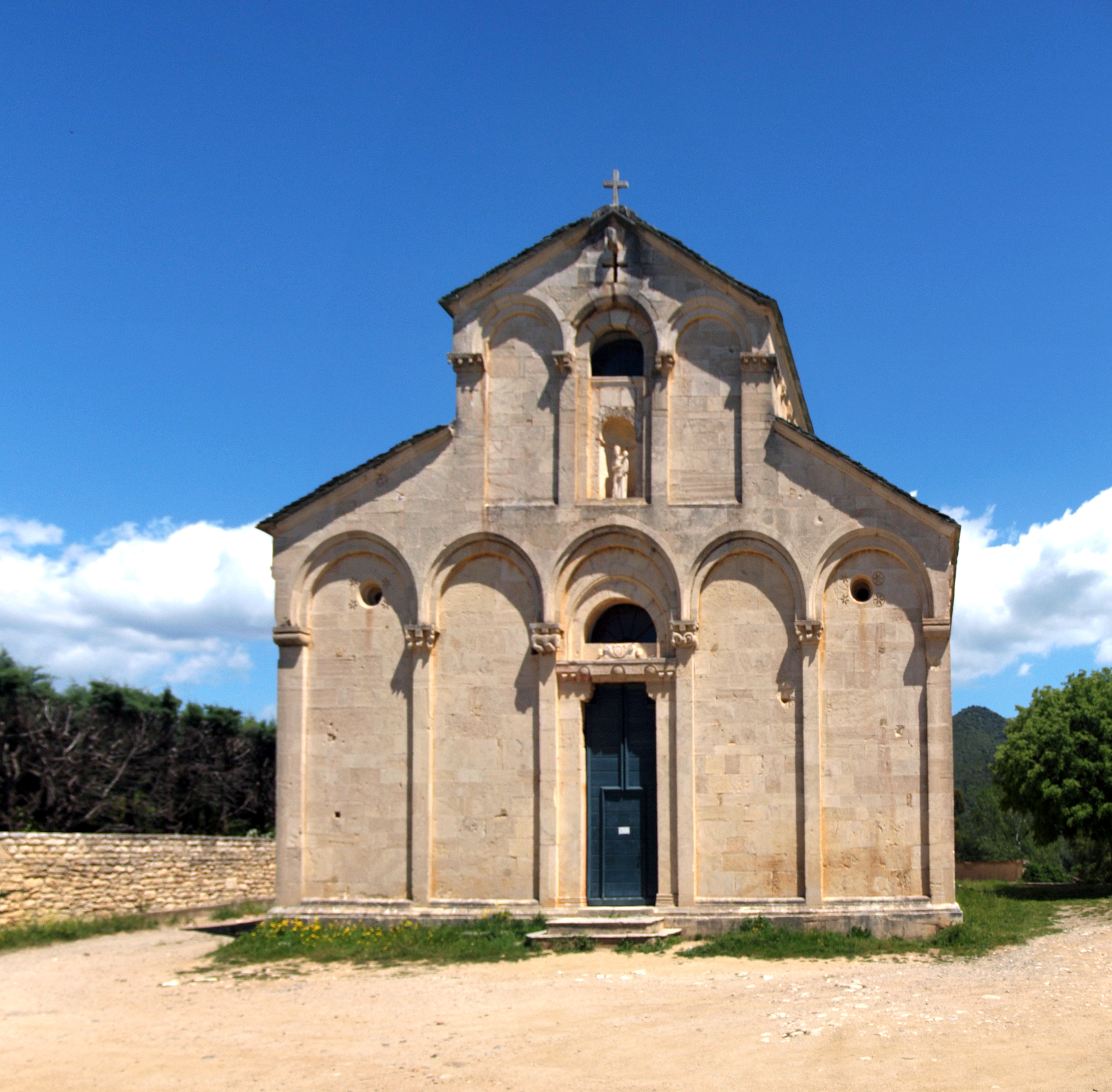 Saint-Florent, Nebbio (Corse) - Église Sainte-Marie (ancienne cathédrale de Nebbio)